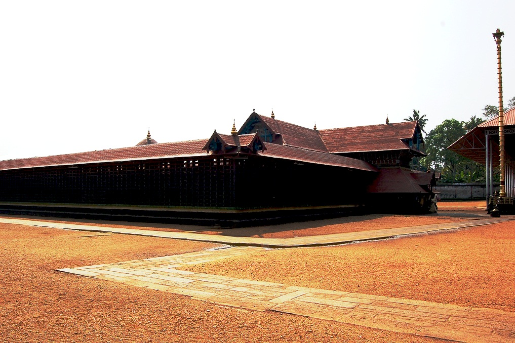 ഏറ്റുമാനൂർ ശിവക്ഷേത്രം